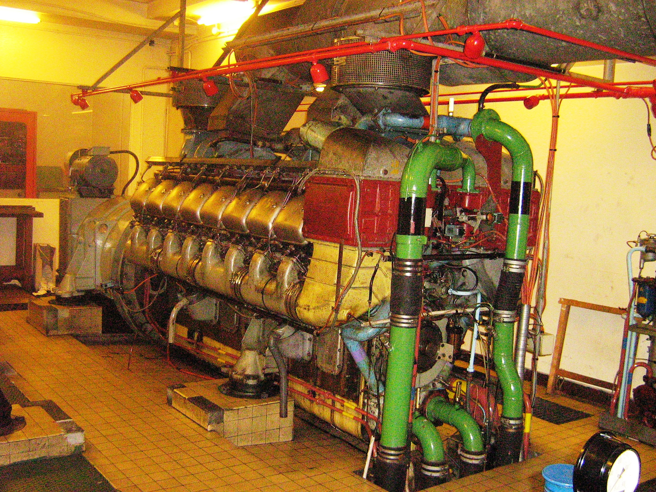 Moteur V16 de groupe électrogène de 1,5 MW (2,1 MW/1h) SEMT Pielstick type moteur diesel 16 PA4 V185. Alimentation électrique du métro de Paris.